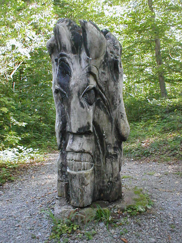 Exponate des Skulpturenparks in Seckach